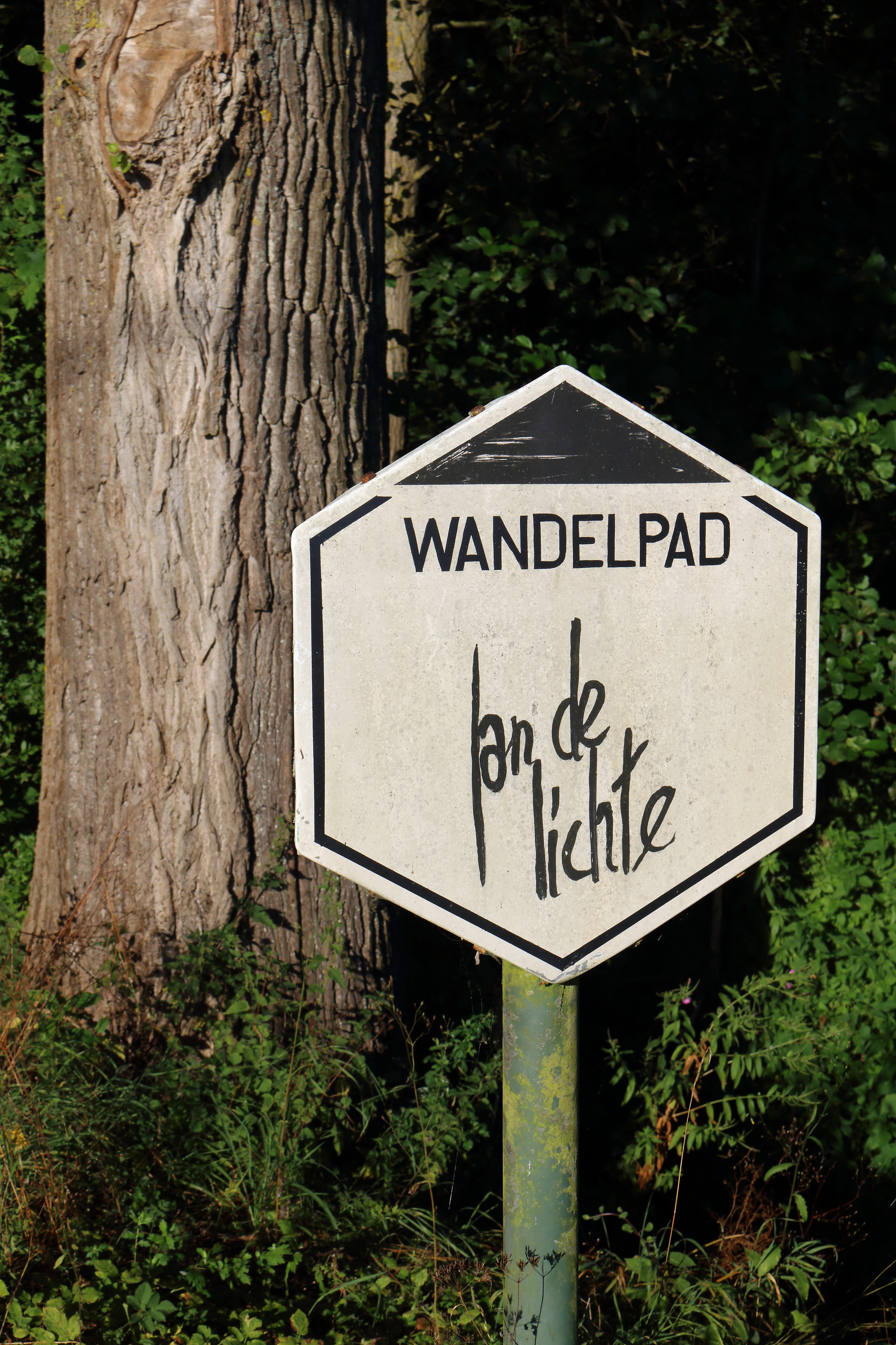 Jan de Lichtepad Zottegem